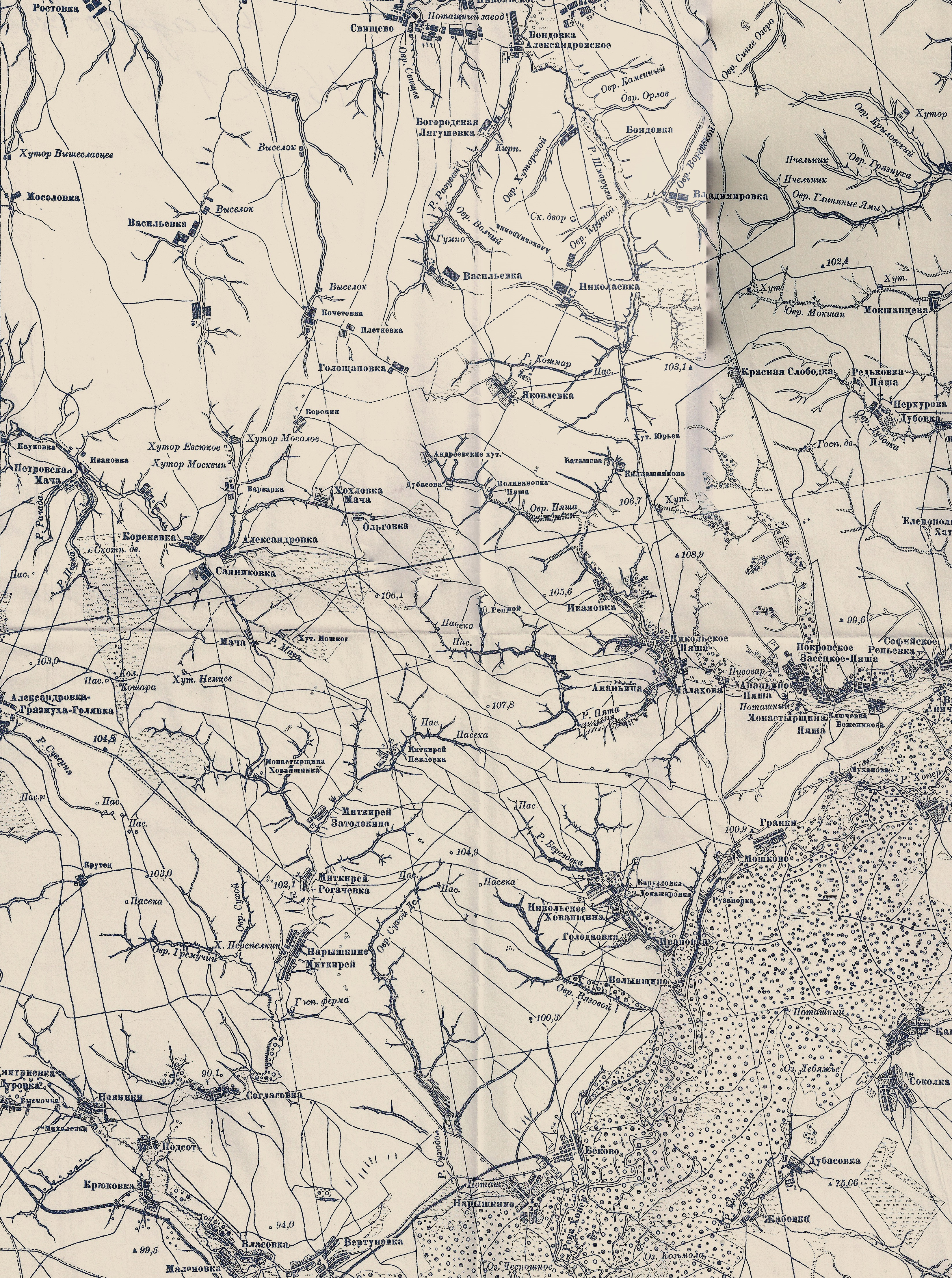 Военно-Топографическая карта Российской Империи Ф. Ф. Шуберта, 3 версты в 1 дюйме, съема 1846—1863 годов, Литография Картографического Отдела, 1919, ряд XVI, лист 21, фрагмент: северо-западная часть Сердобского уезда (территория современного Бековского района).